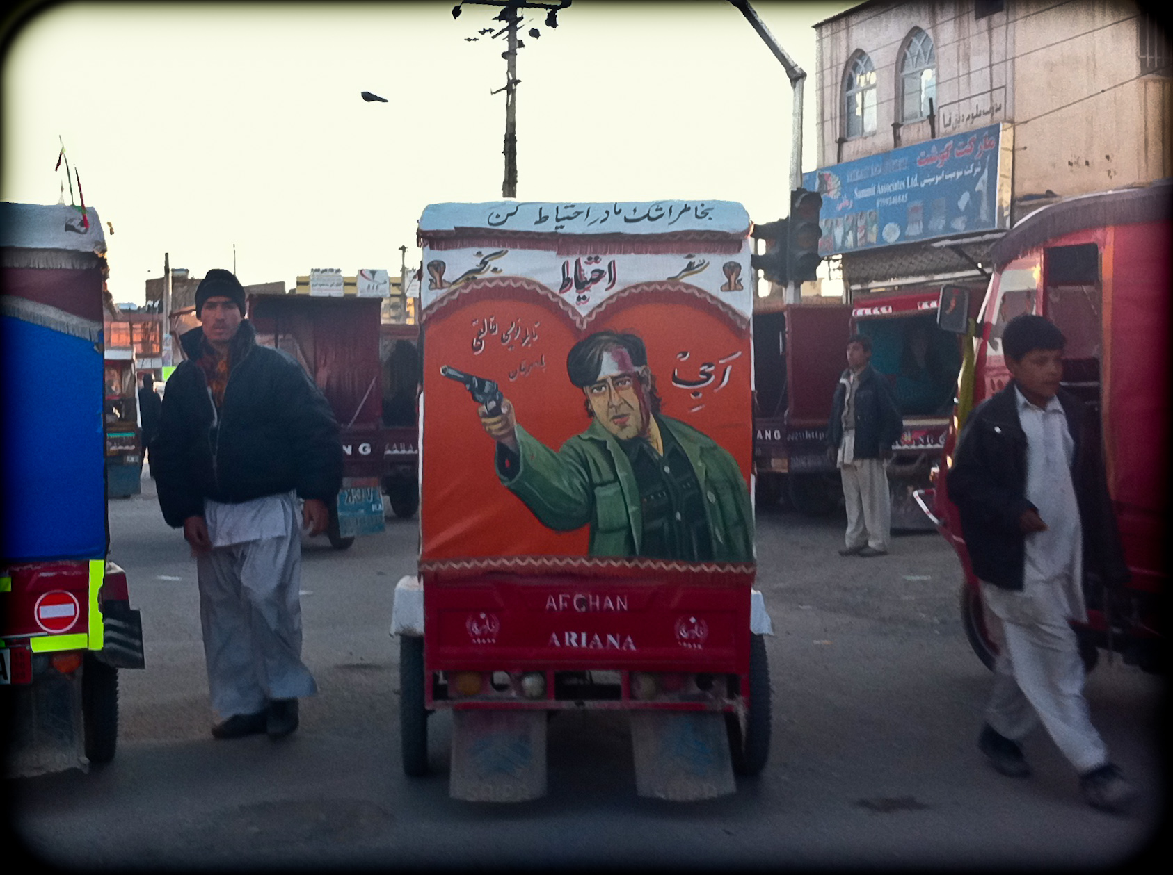 Herat, Afghanistan